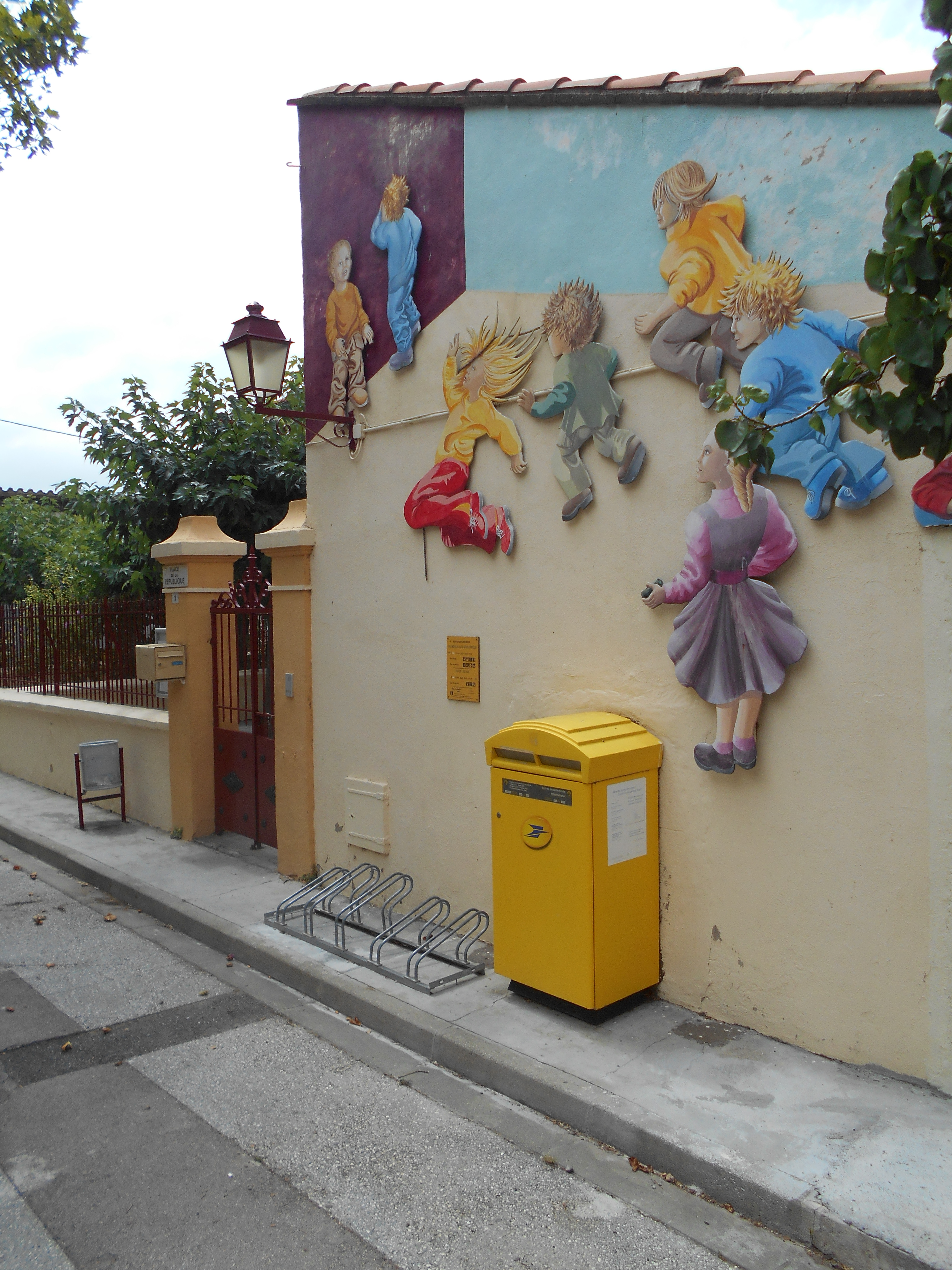 Casa del Comú de Vingrau